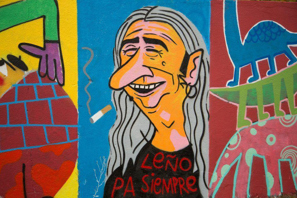 Paredes y muros vacíos, sin ninguna ornamentación. Espacios en blanco y sin contenido que encontramos en algunos lugares de nuestra ciudad están sufriendo una transformación artística. Es el resultado del programa municipal Compartiendo Muros donde se unen la creatividad vecinal y el diseño de un artista para mejorar el paisaje común.